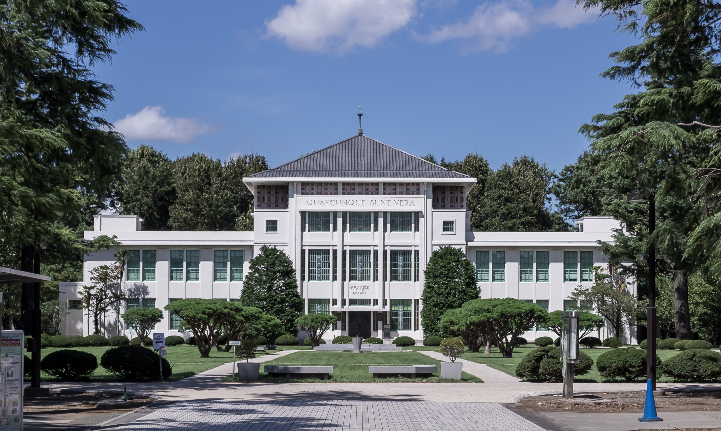 東京女子大学、善福寺キャンパス（東京都杉並区）、本館（登録有形文化財）。 アントニン・レーモンド設計。